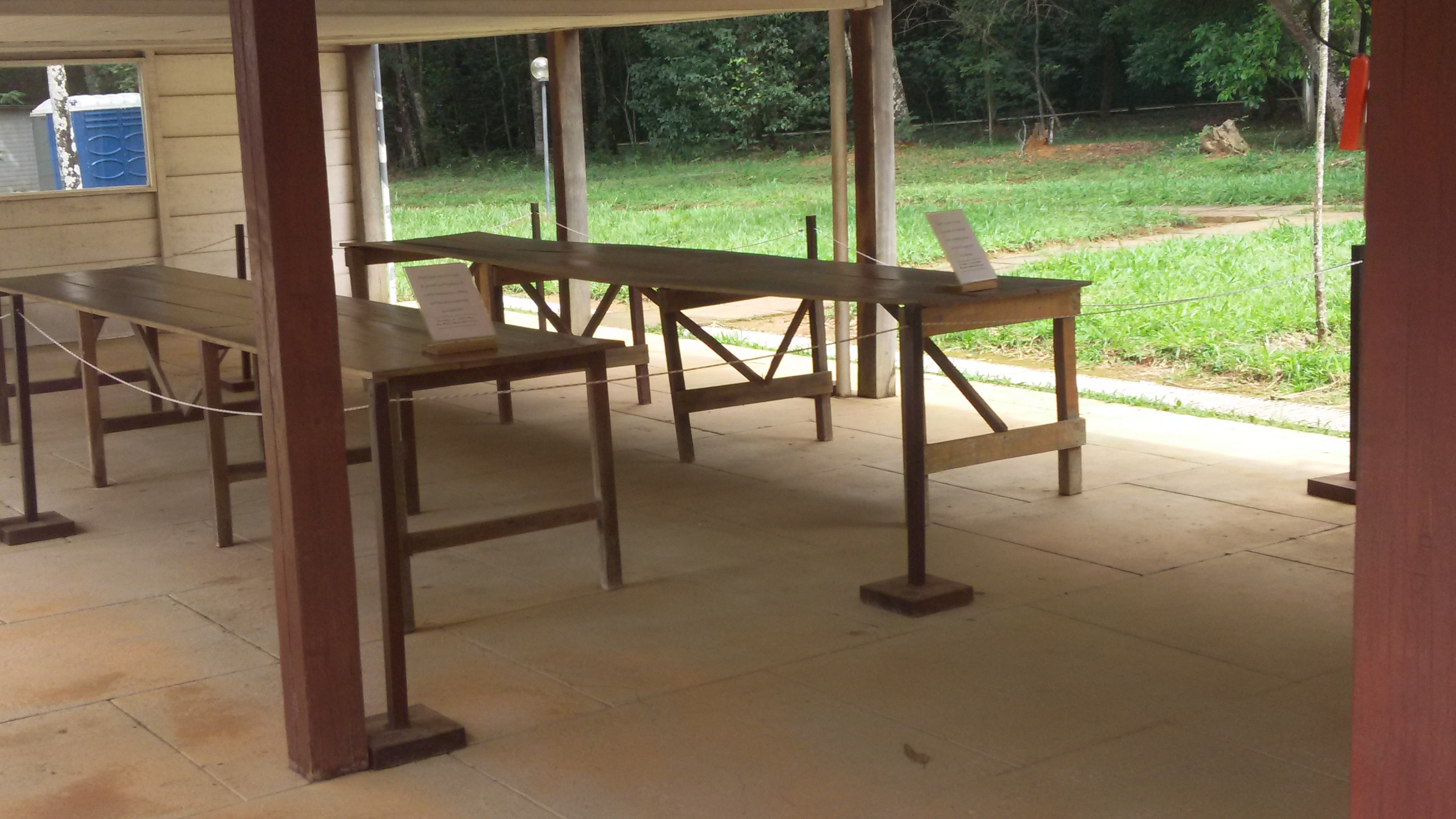 la mesa esta allá pero no se pude sentar